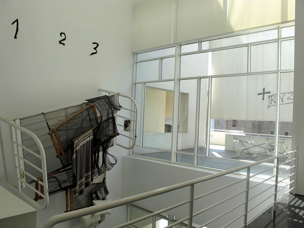 Llit de ferro, somier de malla metàl.lica, mantes de borra de llana, tela de cotó, cadires de ferro plegables, pintura sobre mur, tècnica mixta sobre fusta i altres elements. Dimensions diverses. Fundació MACBA